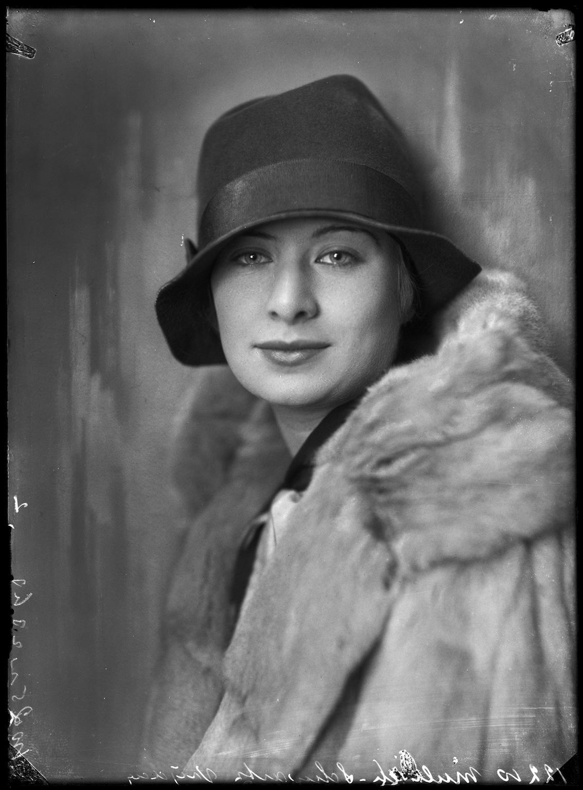 Alice Schwarz (1908-1996) in 1927. Foto Jacob Merkelbach (1877-1942)